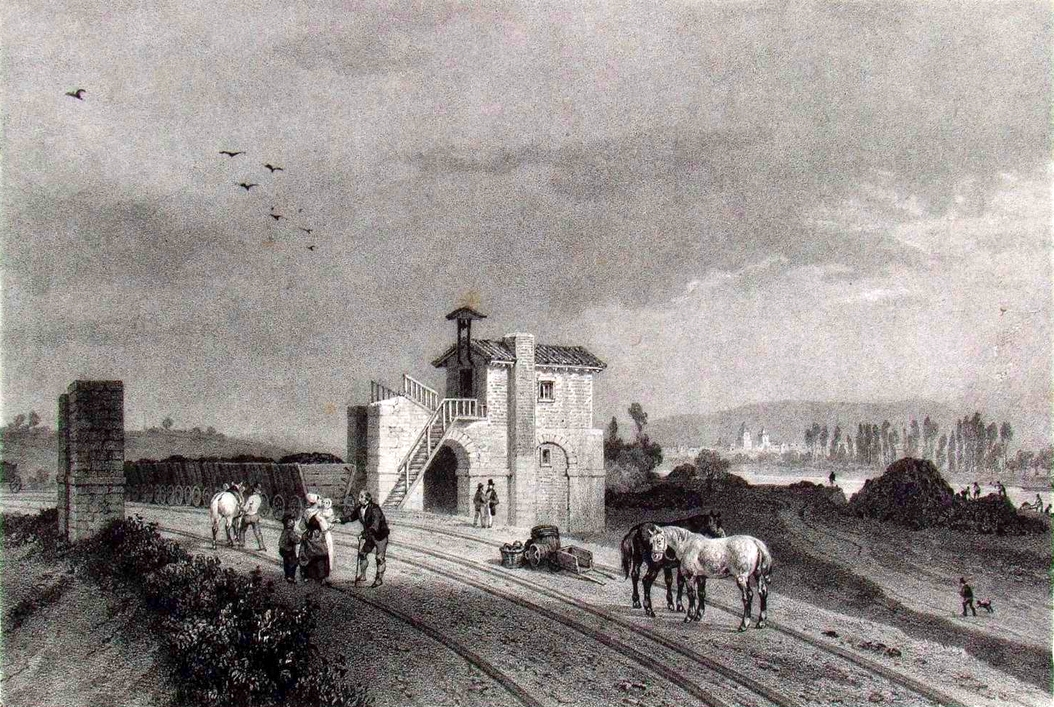 Lithographie parue en 1836 et issue d'un dessin d'après nature du premier chemin de fer français ouvert en 1827 entre St Etienne et Andrézieux. Wagons de charbon tiré par des chevaux. Stockage du charbon au bord du fleuve Loire (à droite de l'image) pour être embarqué sur des bateaux à fond plat appelés rambertes (non visibles ici). En arrière-plan, sur l'autre rive, le village de St Rambert. Au milieu de l'image, édifice dont l'usage n'est pas établi (four à coke ?).